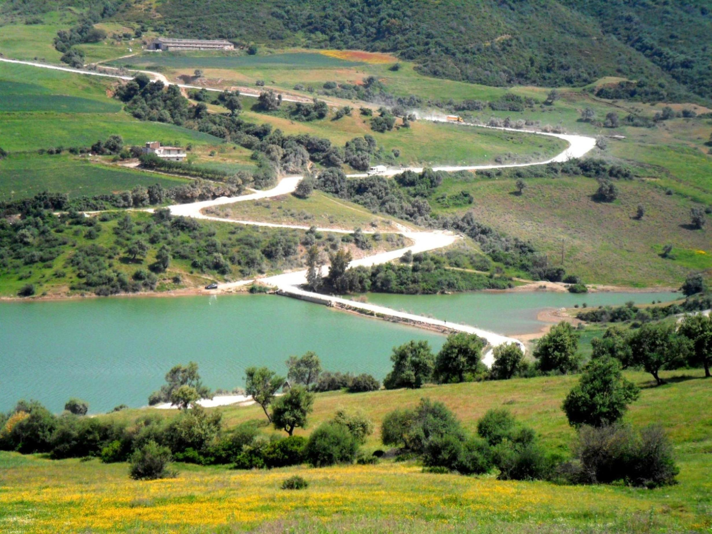 barrage de Keddara سد قدارة